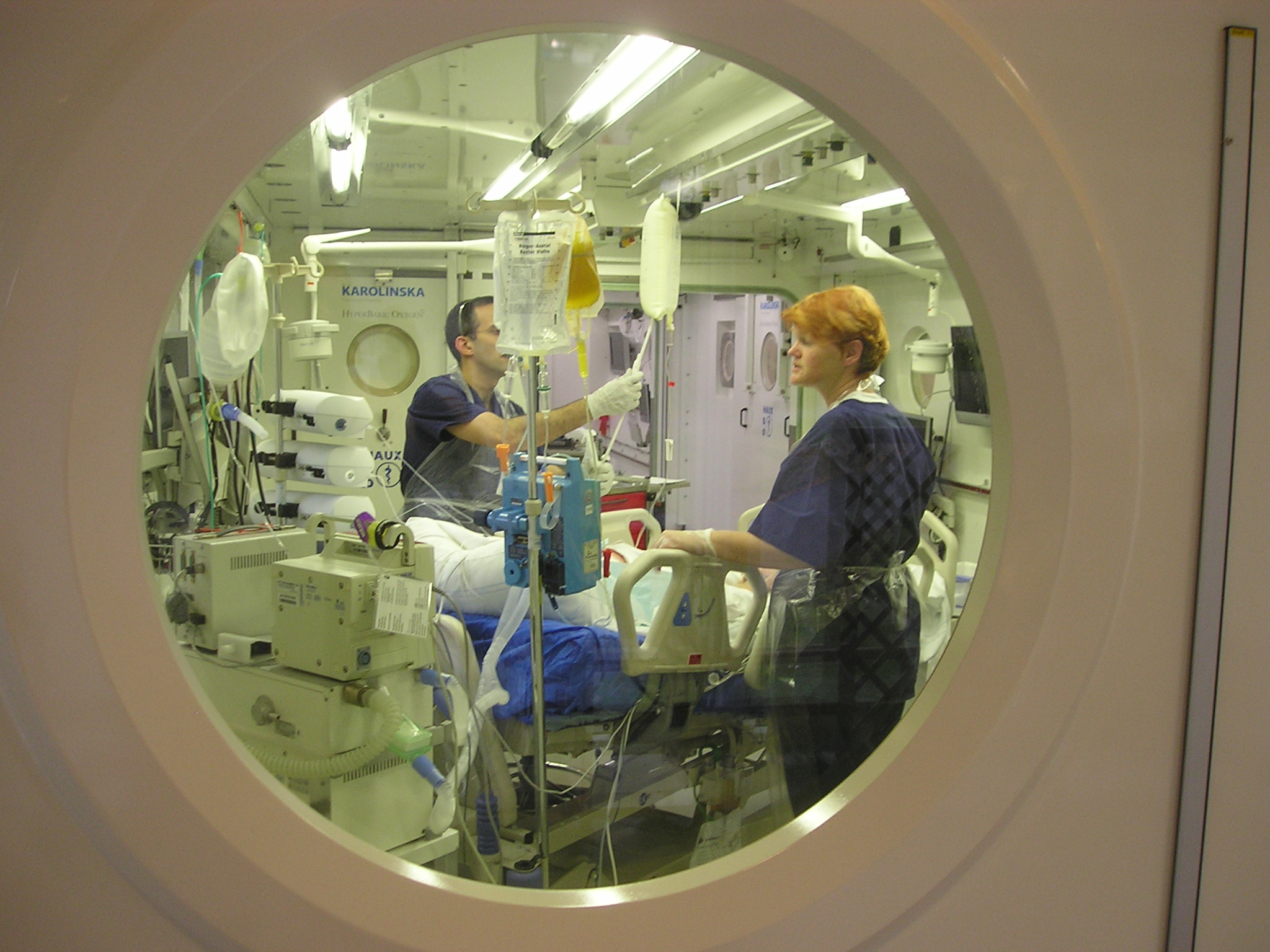 Komora 5